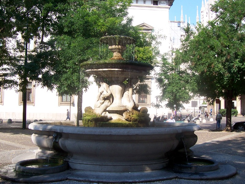 Milano - Fontana del Piermarini (Piazza Fontana)